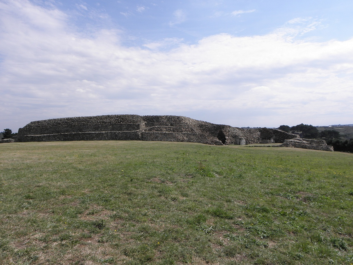 Cairn de Barnenez, commune de Plouezoc'h (29).